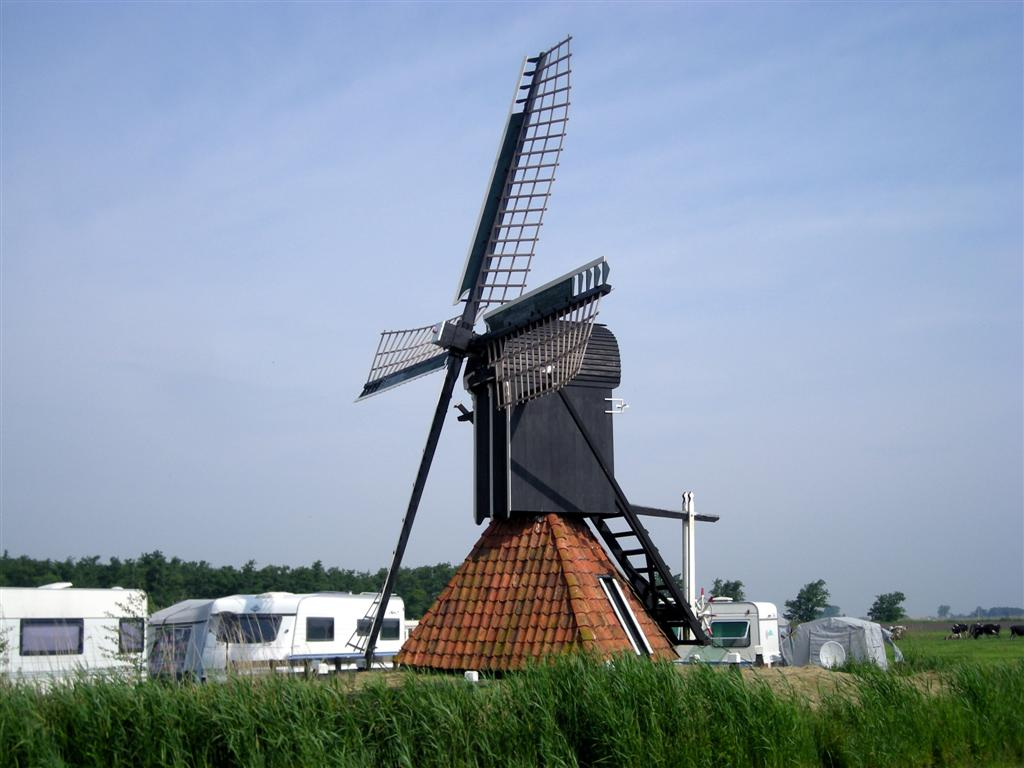 De Modderige Bol in Goengahuizen